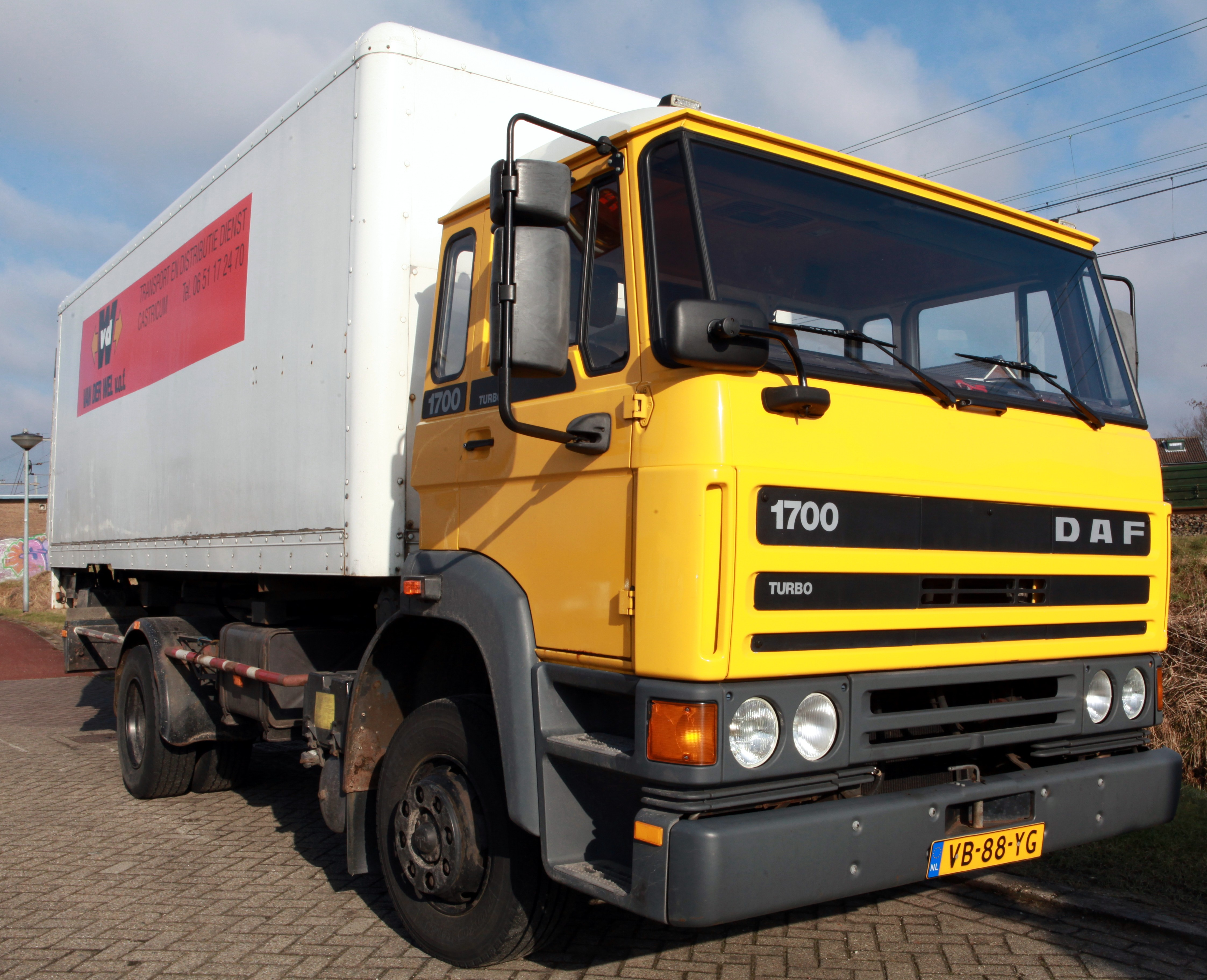 Daf 1700